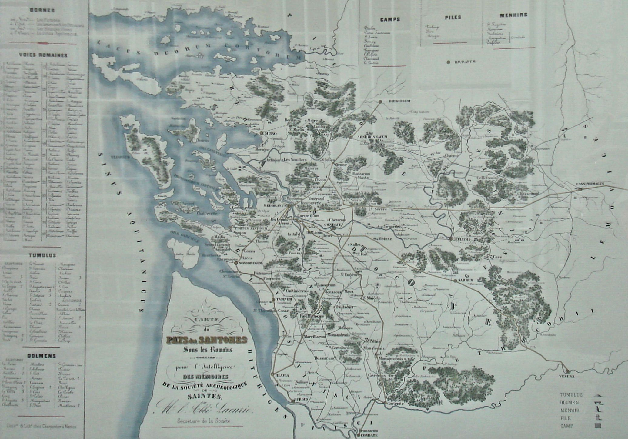 Carte_du_pays_de_Santones_sous_les_Romains